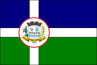 bandeira de coronel murta